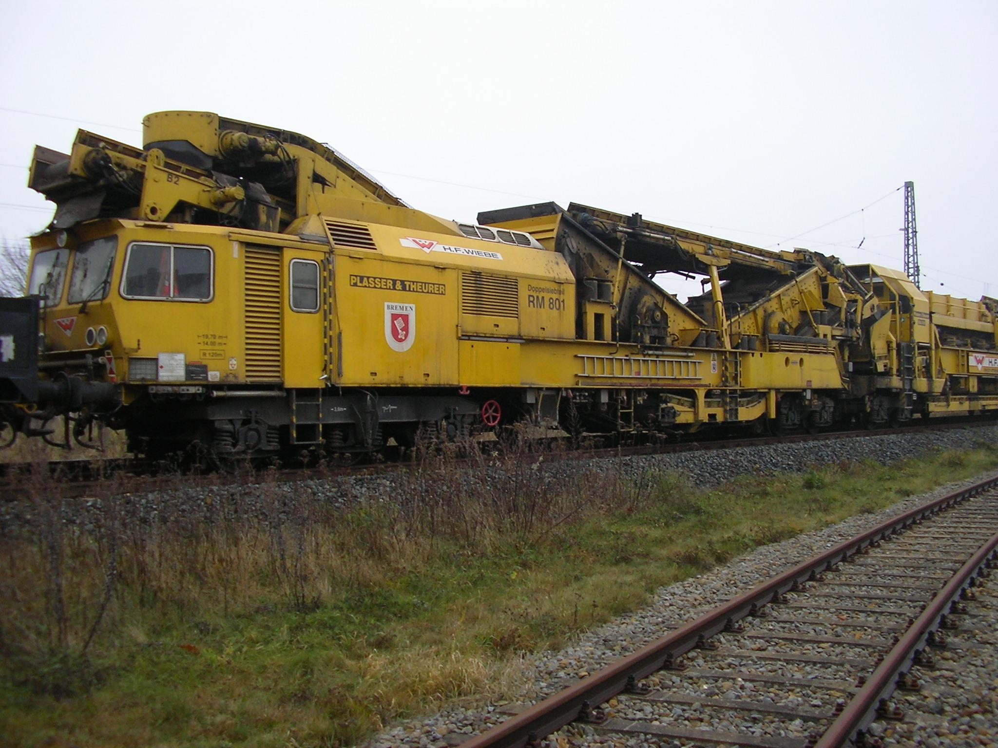 Bettungsreinigungsmaschine RM 801 - Doppelsiebabteil